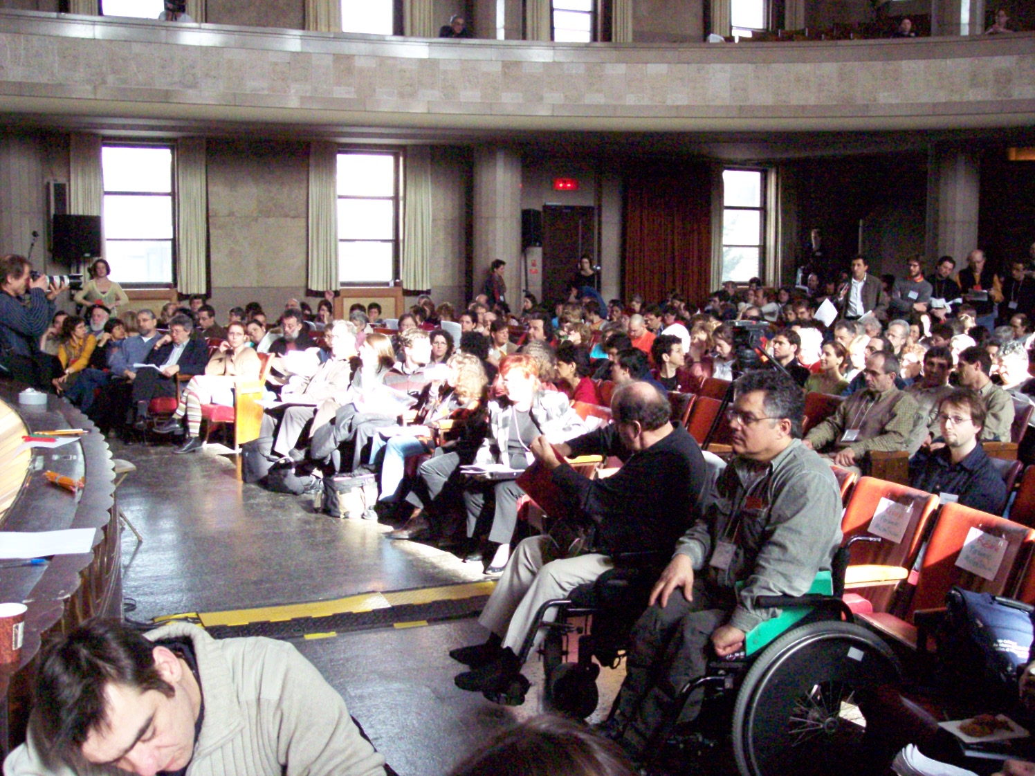 Photo du Congrès de fusion entre l'Union des Forces Progressistes et Option Citoyenne tenu les 3,4 et 5 février 2006 à l'Université de Monteéal.